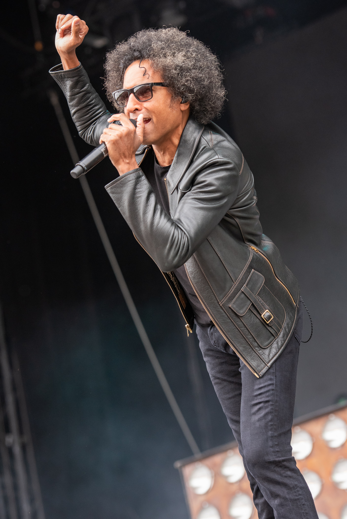 ARGO-Konzerte,Alice in Chains,Konzert,Livekonzert,Livemusik,Musik,RiP,Rock im Park 2019,William DuVall,Zeppelin Stage